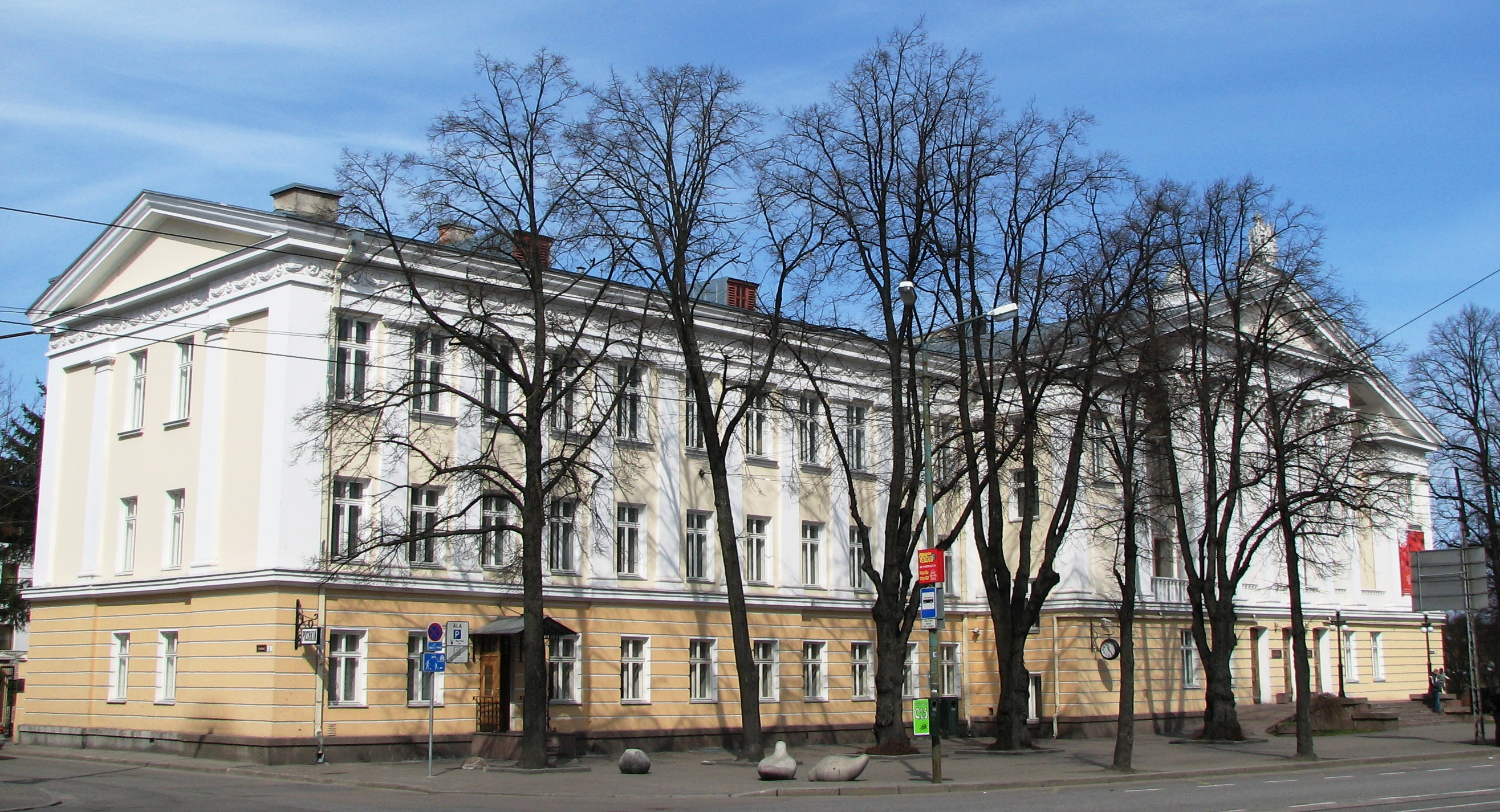 Vene Kultuurikeskus Tallinnas, Mere pst 5